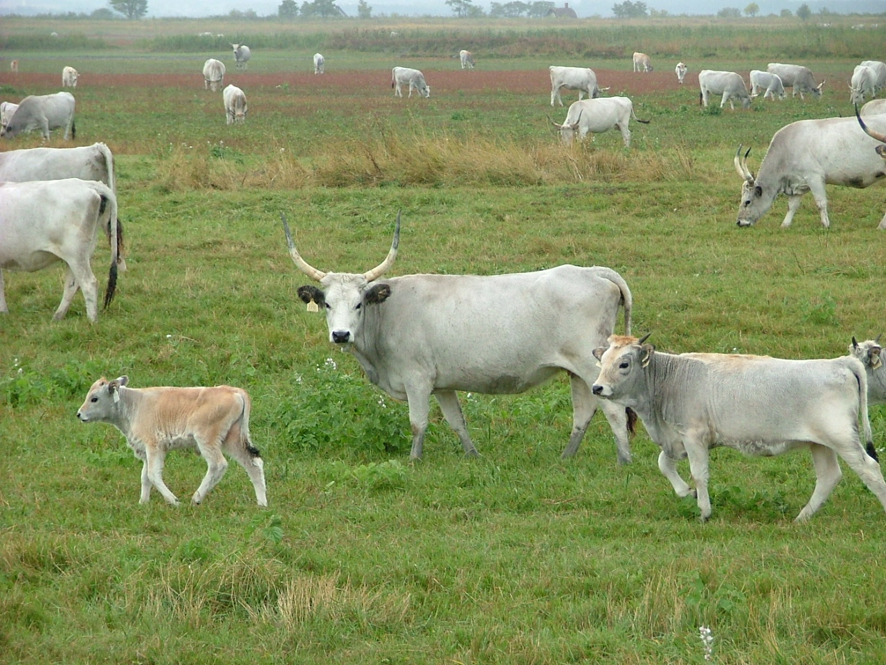 Foto: Bárdos Dezső-Pintye Dávid Győr